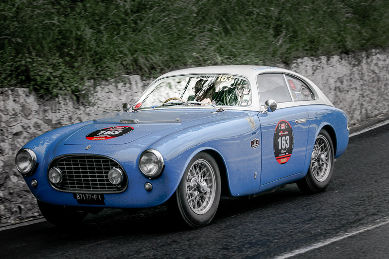 1000 miglia 2012 - SS della Futa . Pianoro (BO)